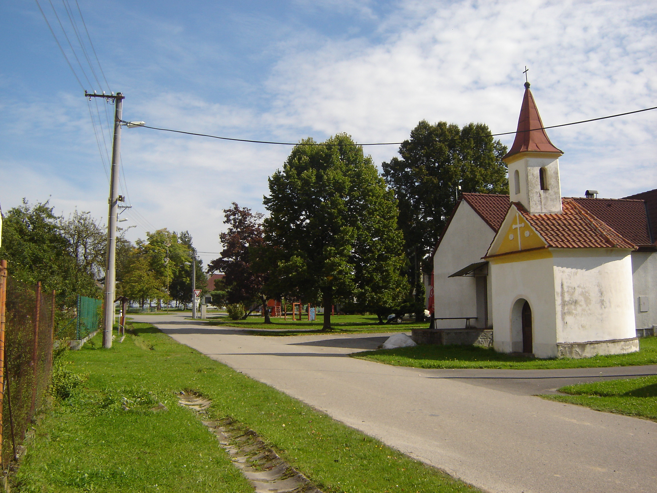 kaplička